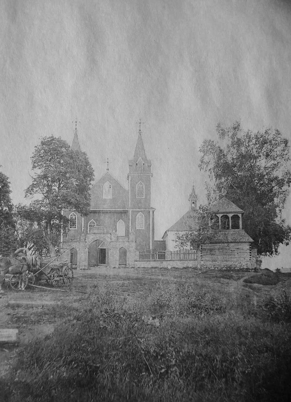 Беларуская (тарашкевіца): Забрэзьзе (Zabreźzie). Касьцёл